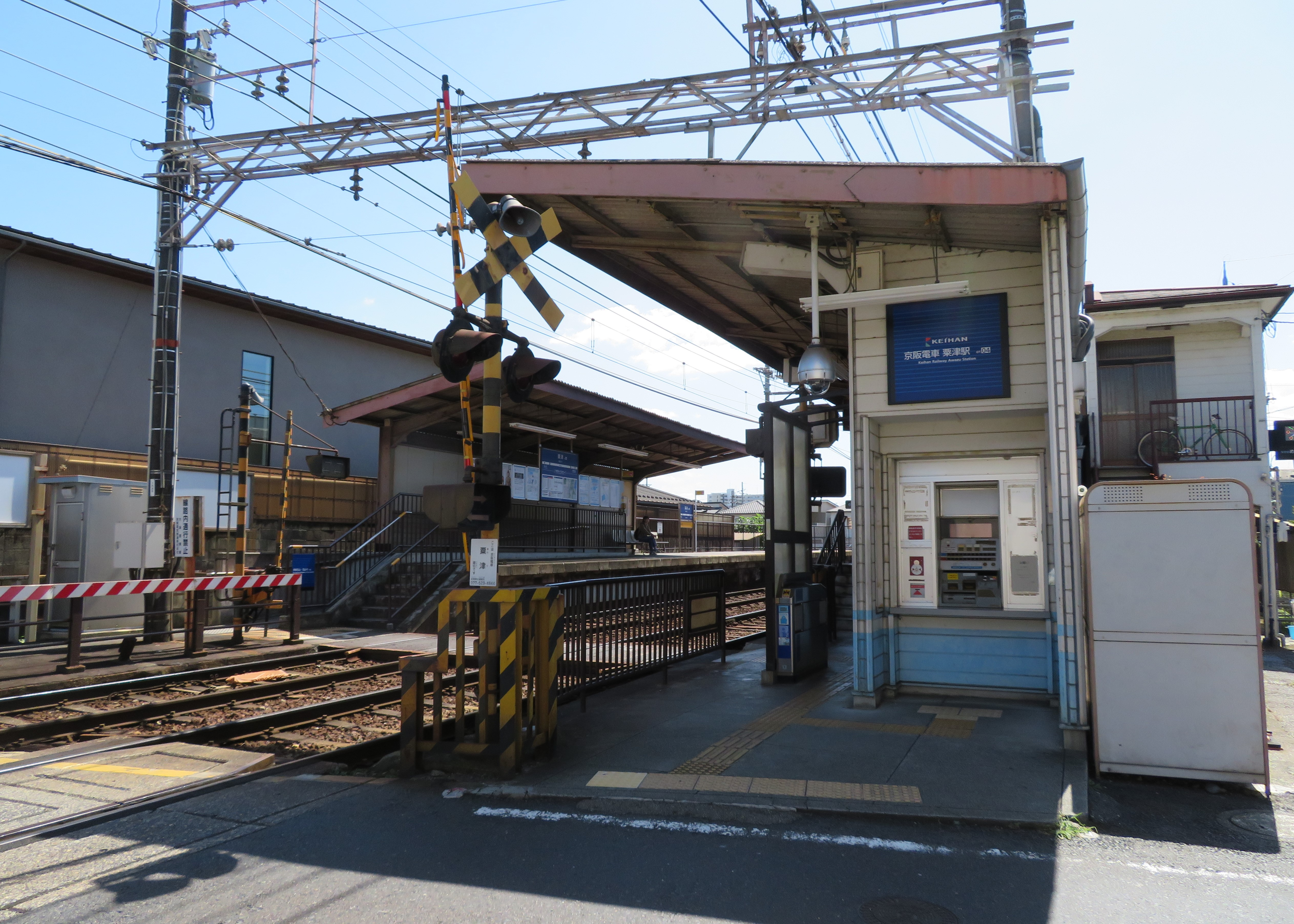 京阪電鉄粟津駅